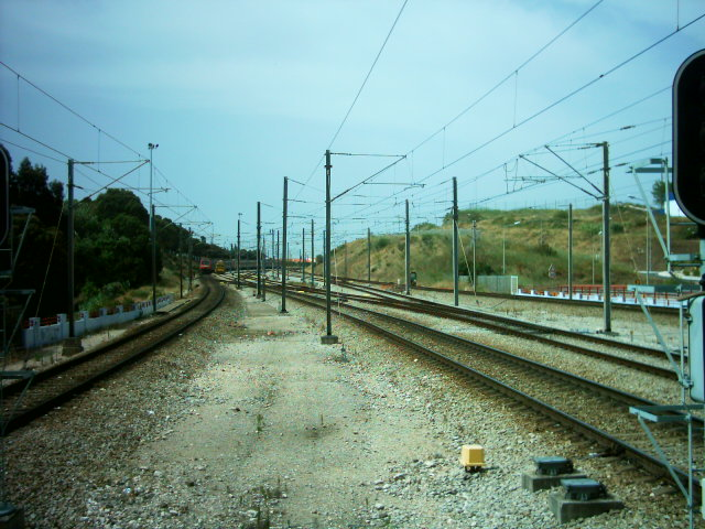 Aproximação à estação ferroviária de Monte Abraão